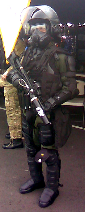 Miembro de la Policía Nacional de Panamá portando equipo completo Antidisturbio (mascara anti gas, casco, protectores corporales, arma para lanzar municiones de agentes quimicos)